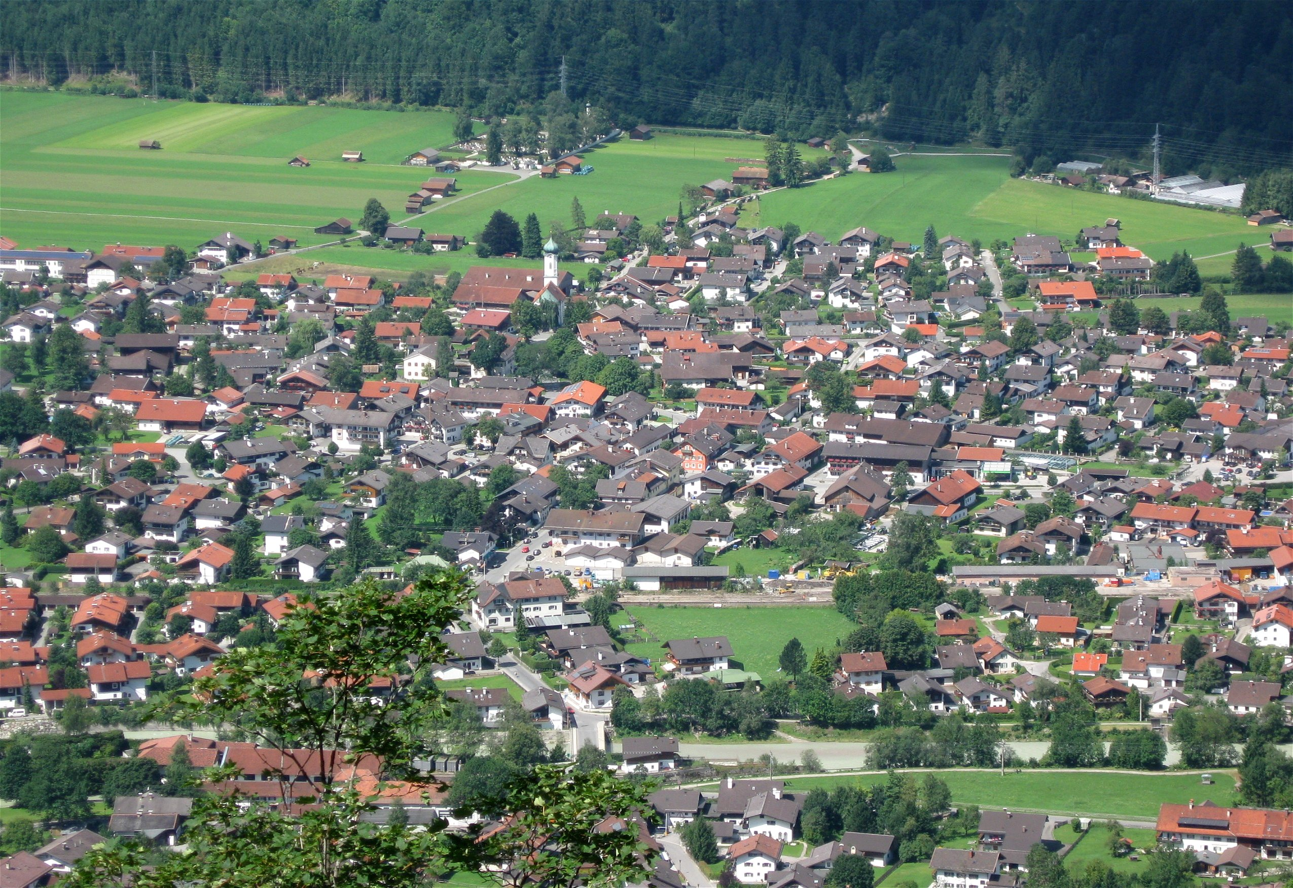 Farchant, von Osten gesehen